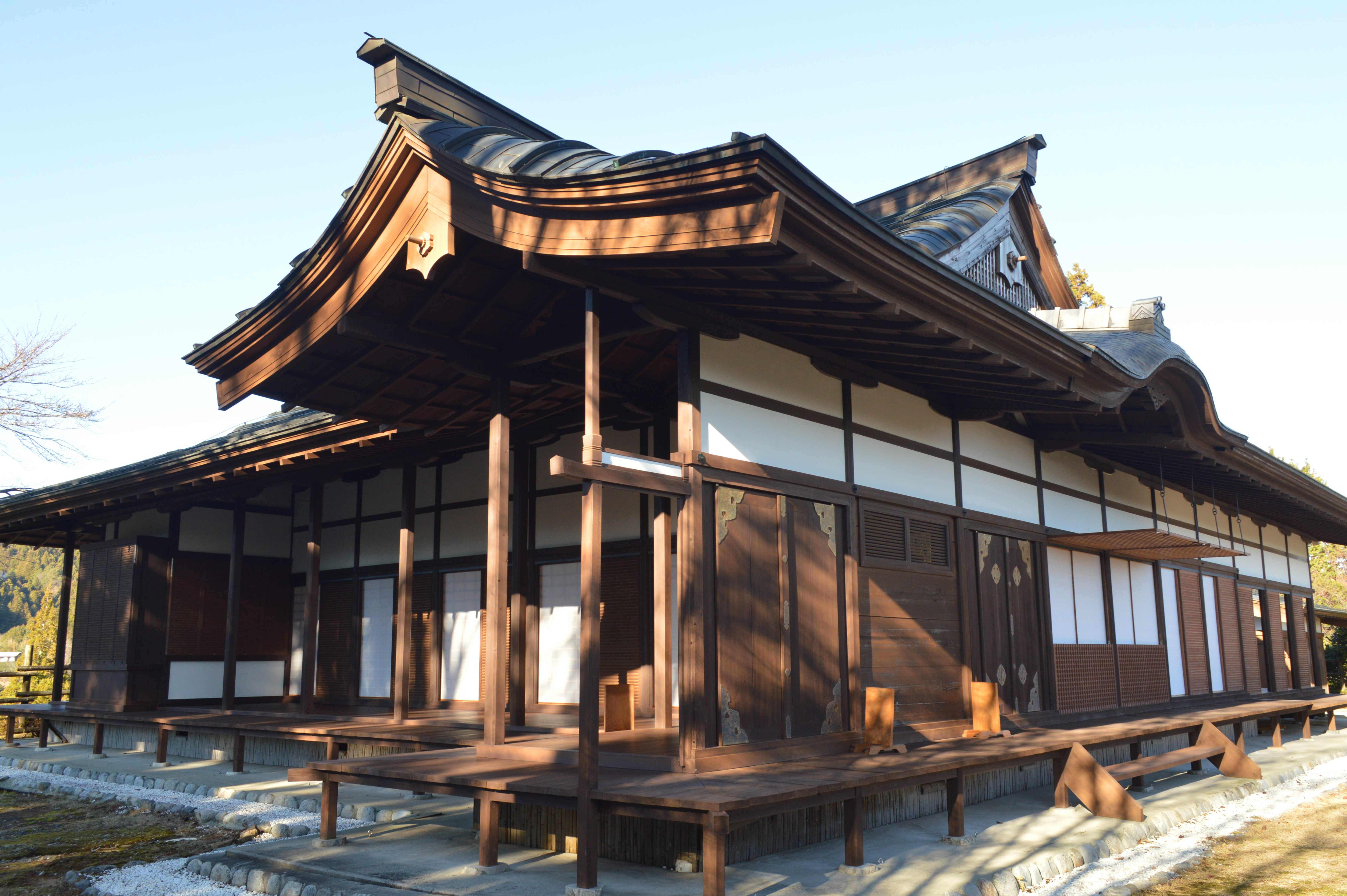 愛知県北設楽郡設楽町にある田峰城本丸御殿。